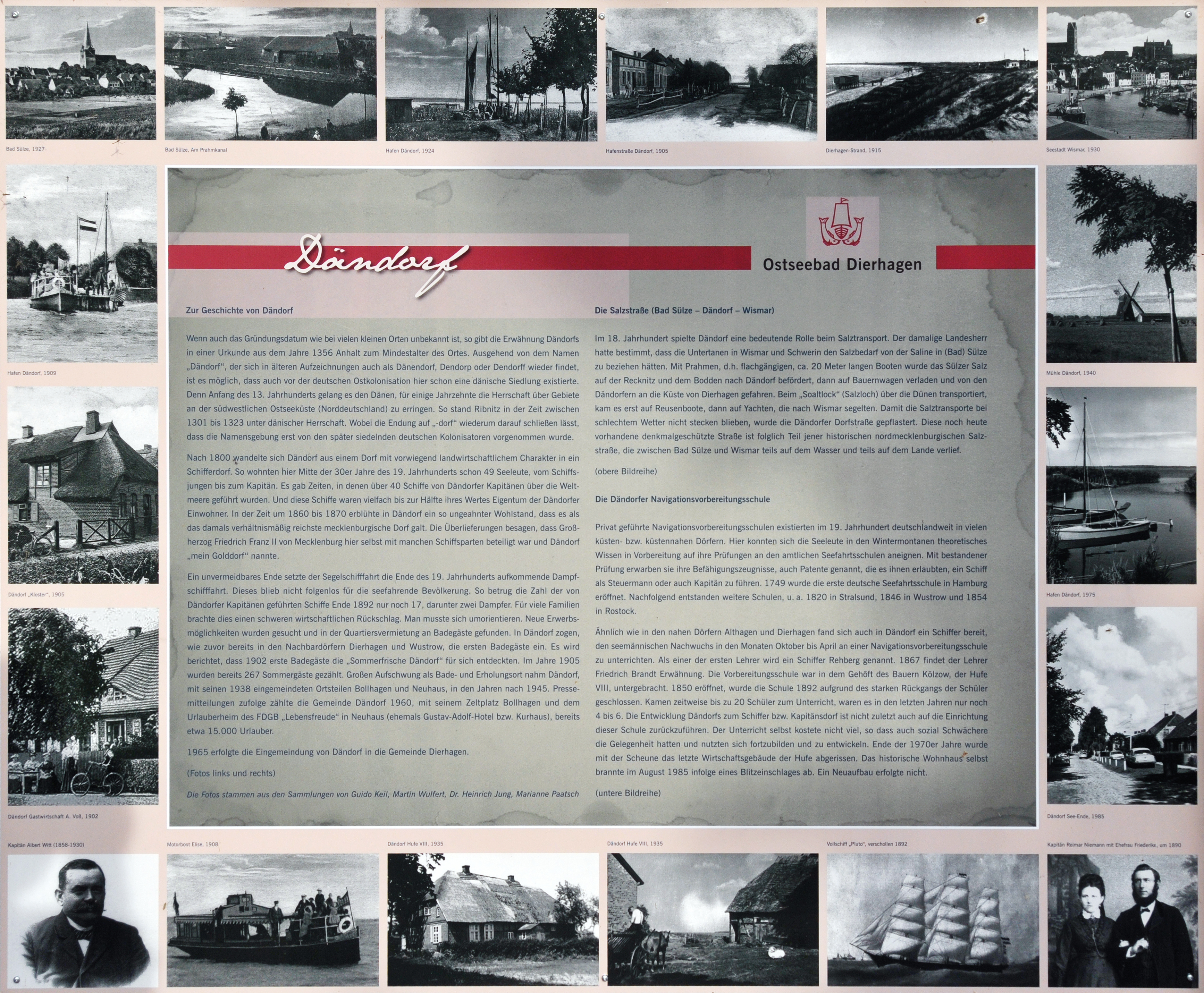 Geschichtstafel im Hafen von Dierhagen-Dändorf. Auf der Tafel wird die Entwicklung von Dierhagen dargestellt.